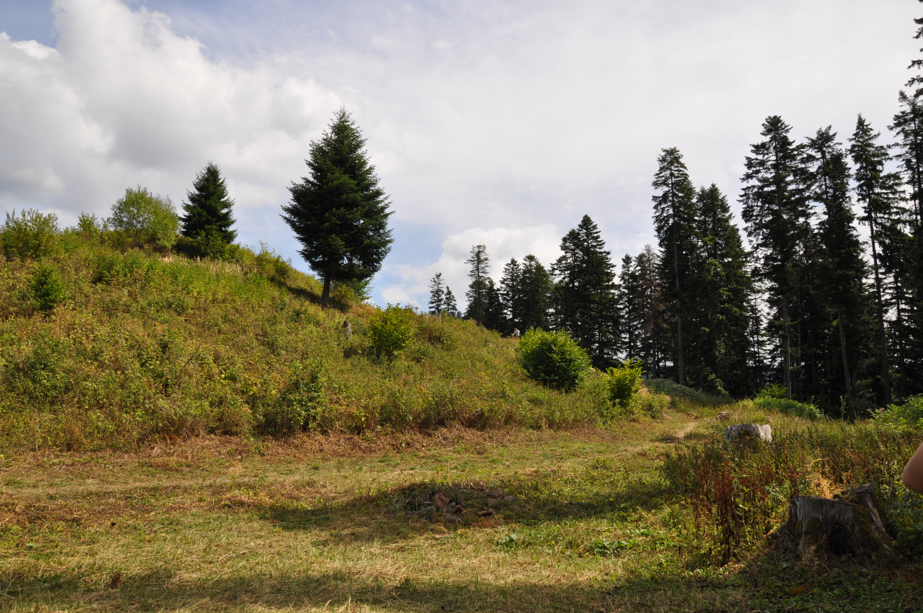 Situl arheologic de la Covasna, "Cetatea Zânelor"